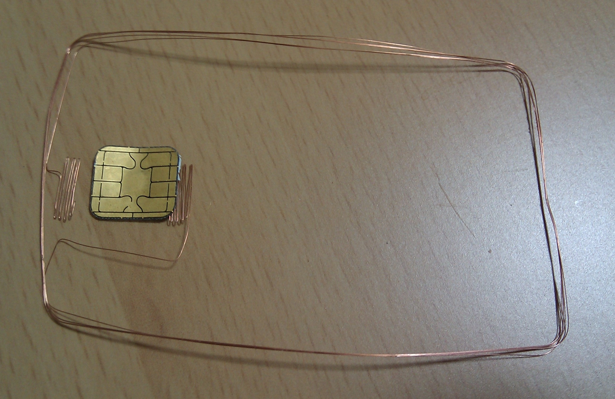 마이비카드 콤비형, 디지털경남카드 분해 사진